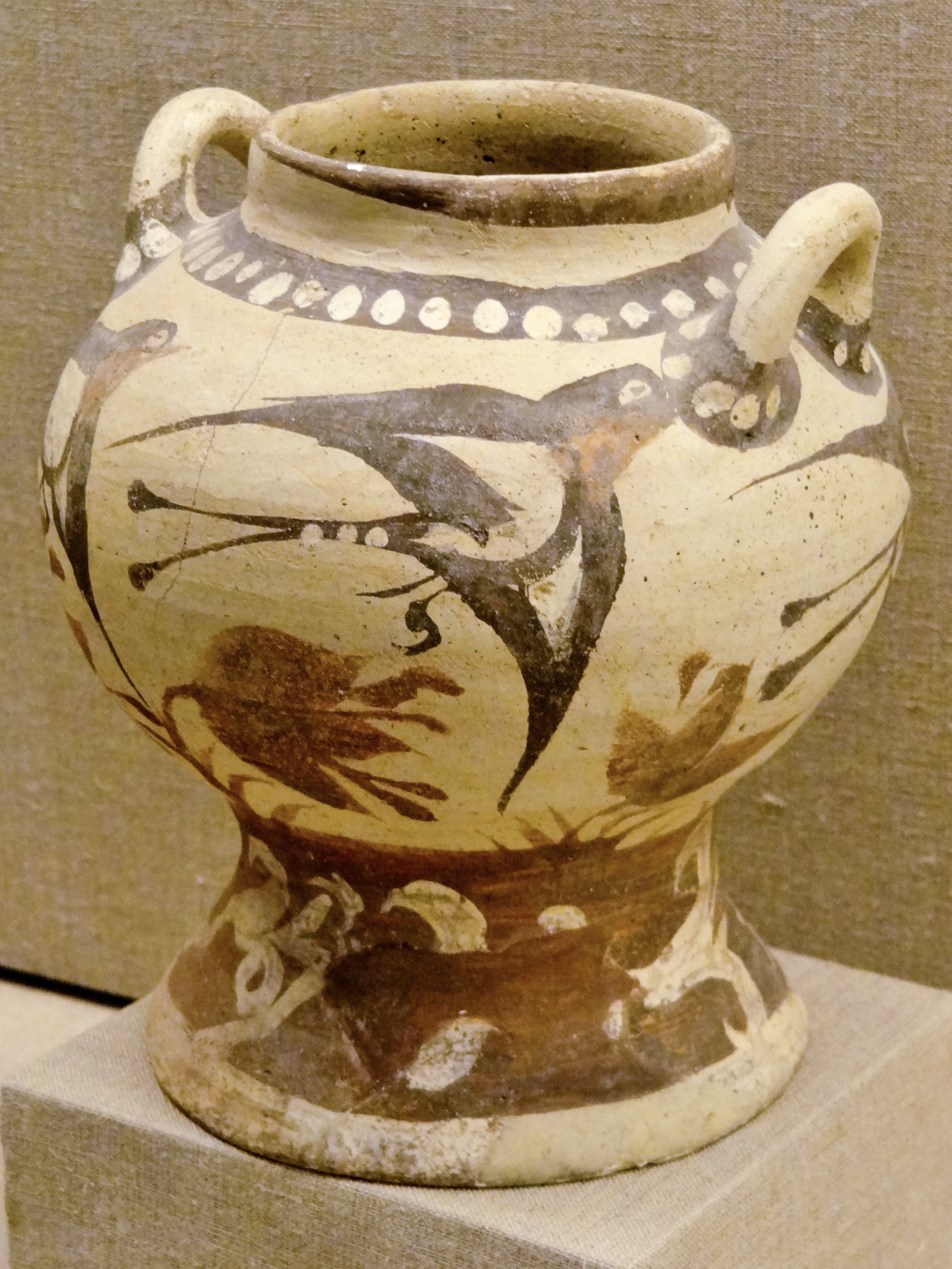 Krug mit Schwalben (17. Jahrhundert v. Chr.) aus der Ausgrabungsstätte bei Akrotiri (Santorin) im Prähistorischen Museum von Thira, Santorin (Thira), Kykladen, Griechenland